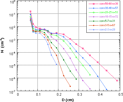 Drop Size Distribution/Granulamétrie de pluie